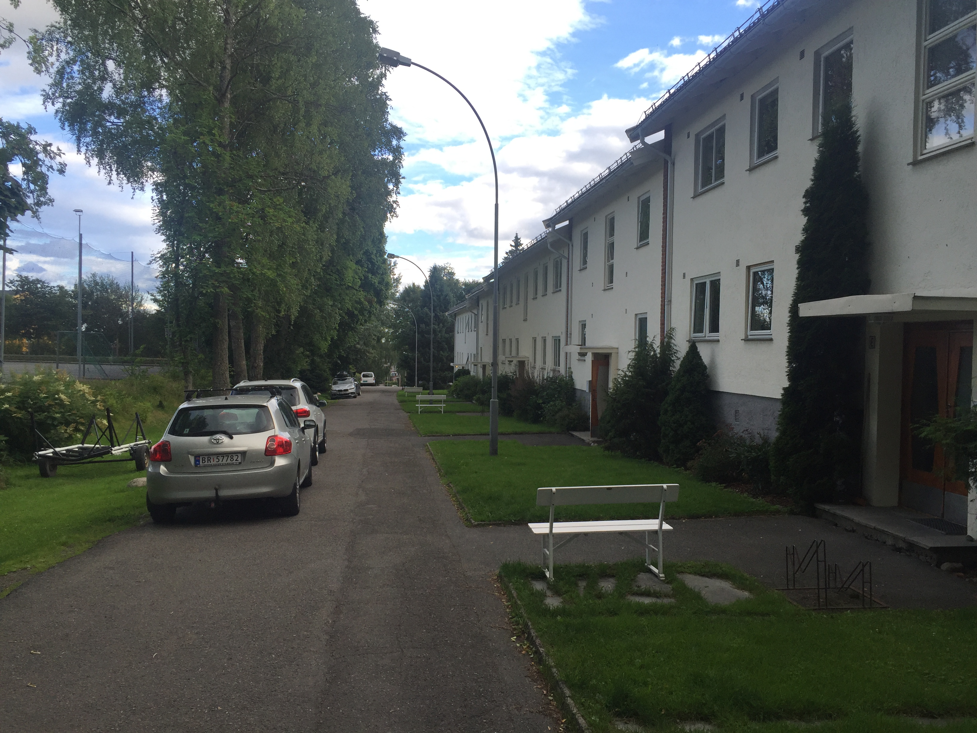 Bjerkebakken i Oslo.